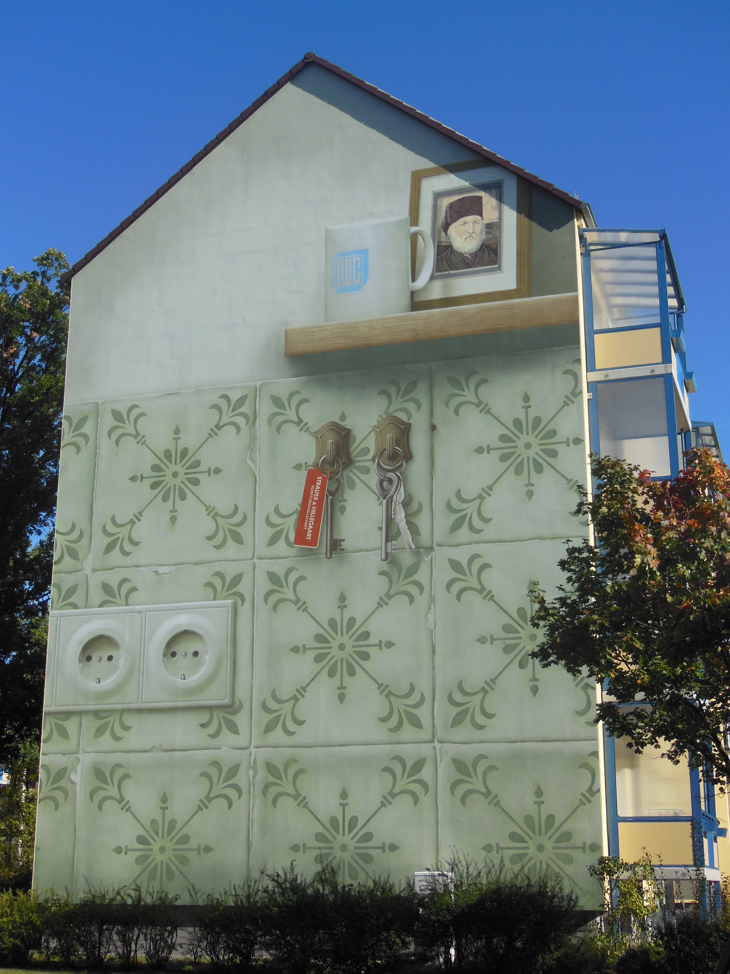 Gestaltete Fassade entlang der Straße der Jugend in Cottbus